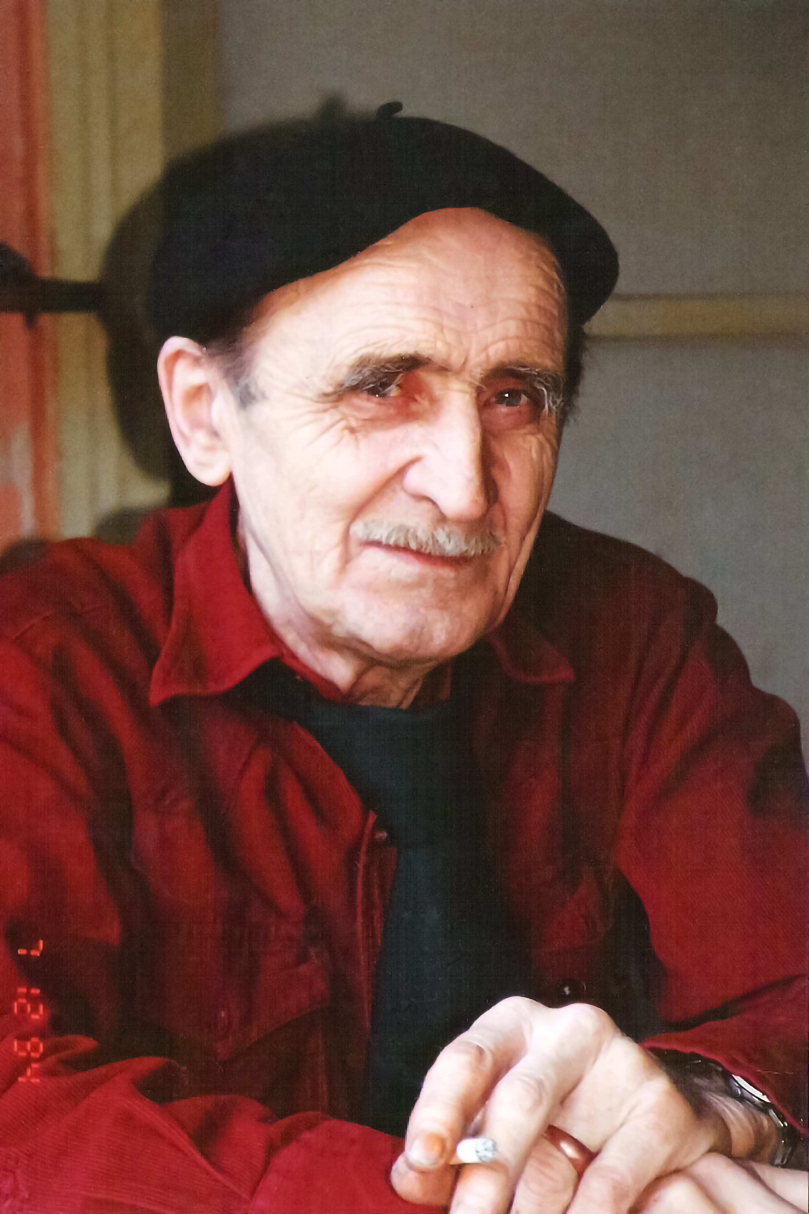 12.07.1994 Портрет Лінинського Петра Степановича